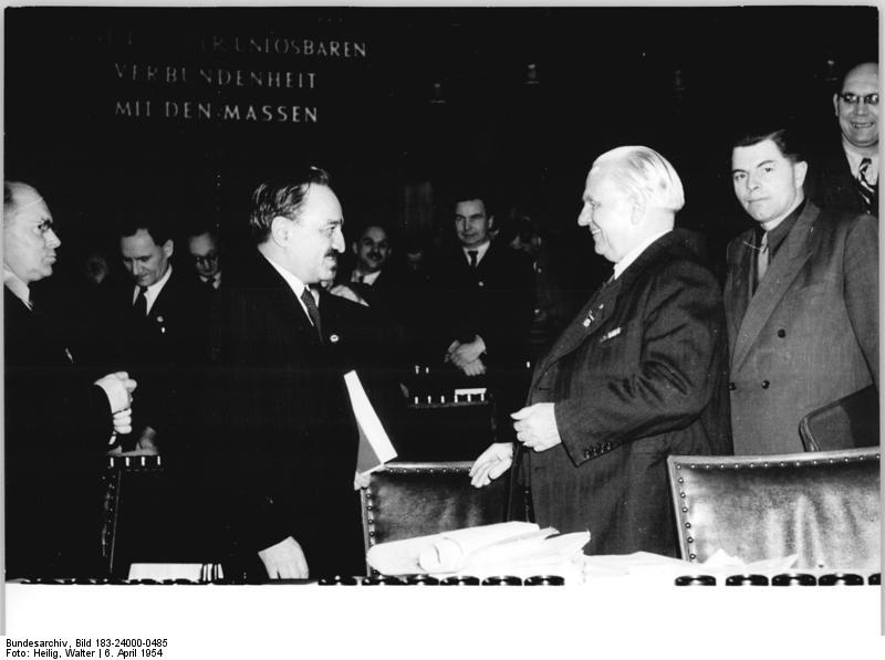 ADN-ZB-Heilig Zi-Schm 6.4.1954 IV. Parteitag der Sozialistischen Einheitspartei Deutschlands, Berlin, Werner-Seelenbinderhalle UBz.: Das Mitglied des Präsidiums des Zentralkomitees der KPdSU, A.I. Mikojan beglückwünscht den Vorsitzenden der Sozialistischen Einheitspartei Deutschlands. Wilhelm Pieck, nach Abschluss des Parteitages zur Wiederwahl des Vorsitzenden der SED. Stammabzug darf nicht aus dem Hause